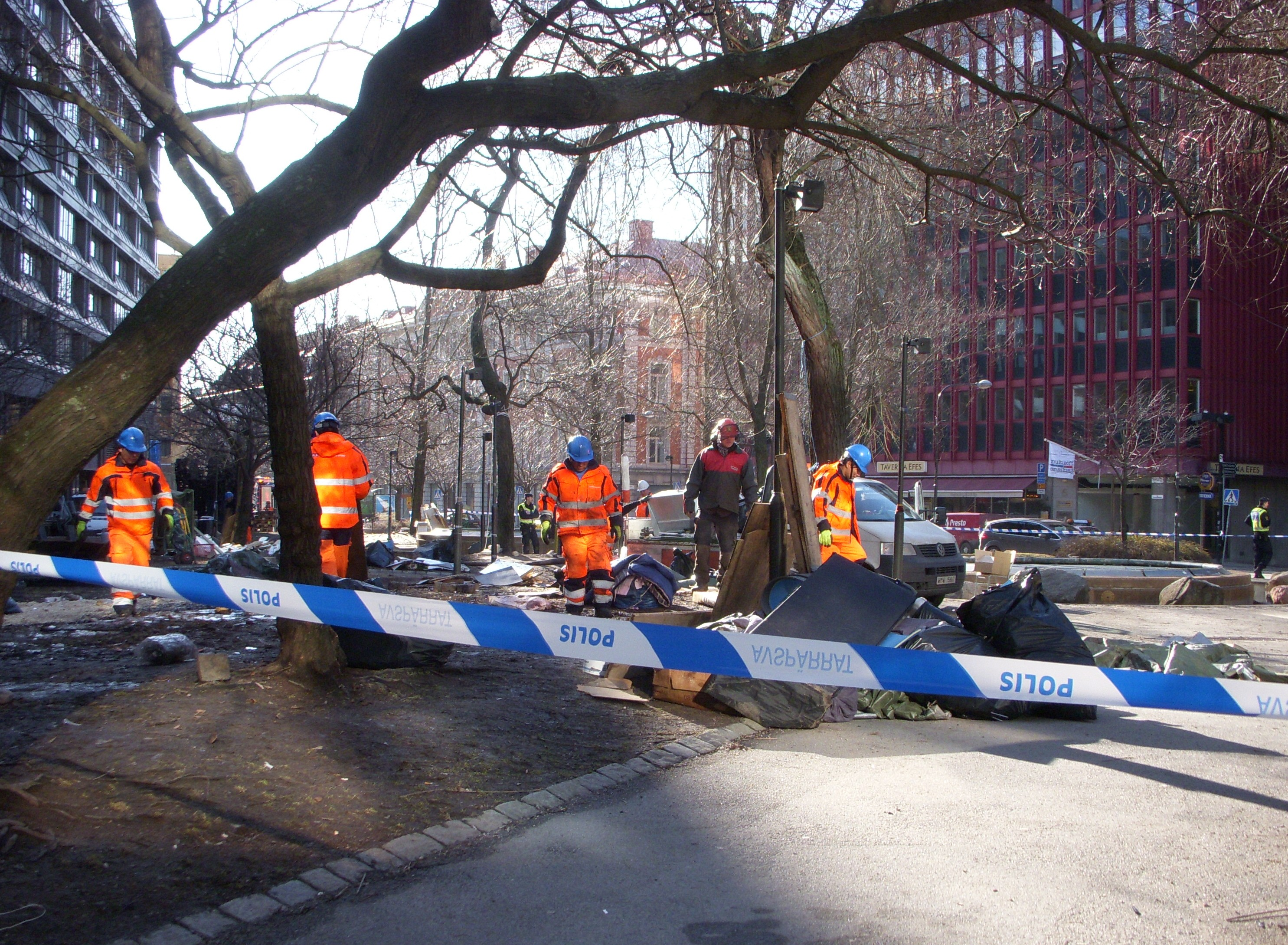 Occupy-rörelsens tältläger på Brunkebergstorg i Stockholm rivs av polisen